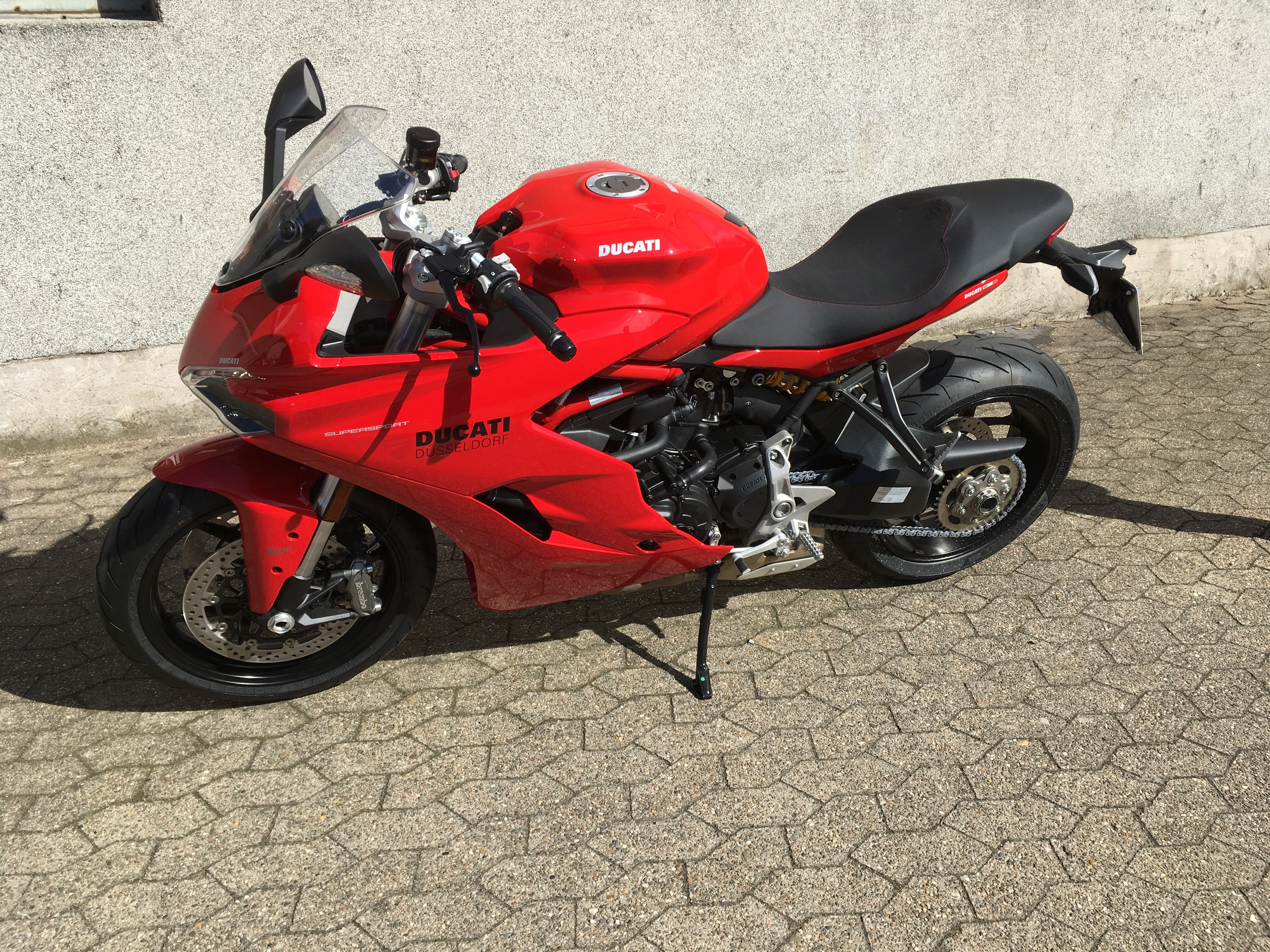 SuperSport Model 2017